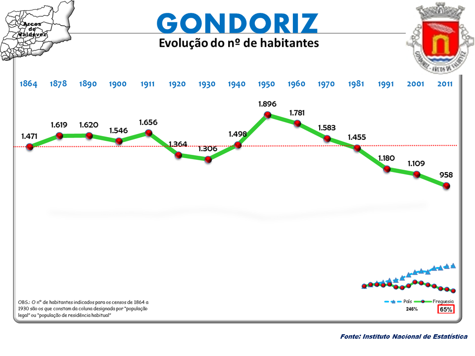 Censos 1864/2011